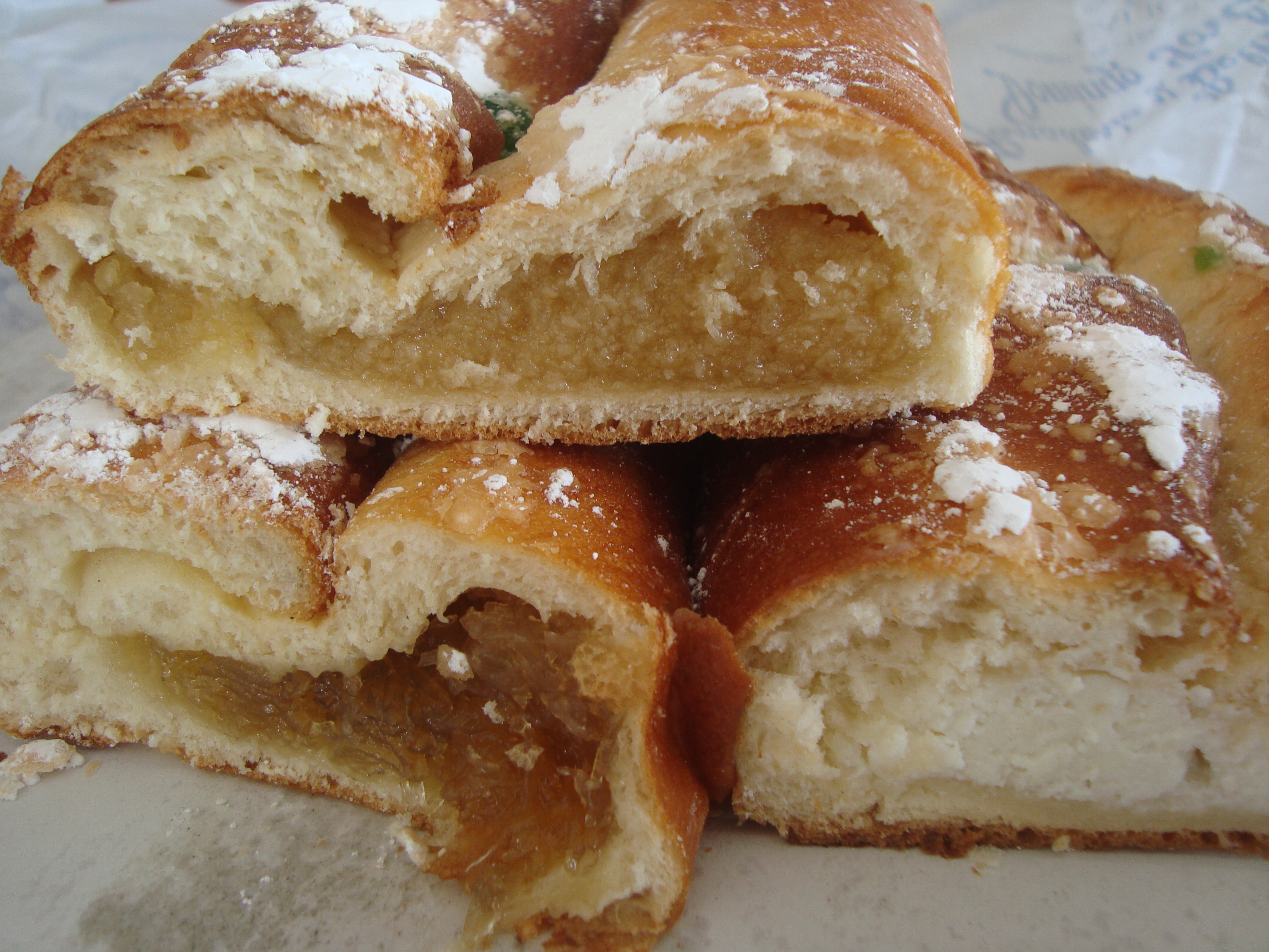 Harinosas dulces de Càlig, rellenas de confitura de cabello de ángel, boniato, calabaza amarilla, requesón o chocolate.